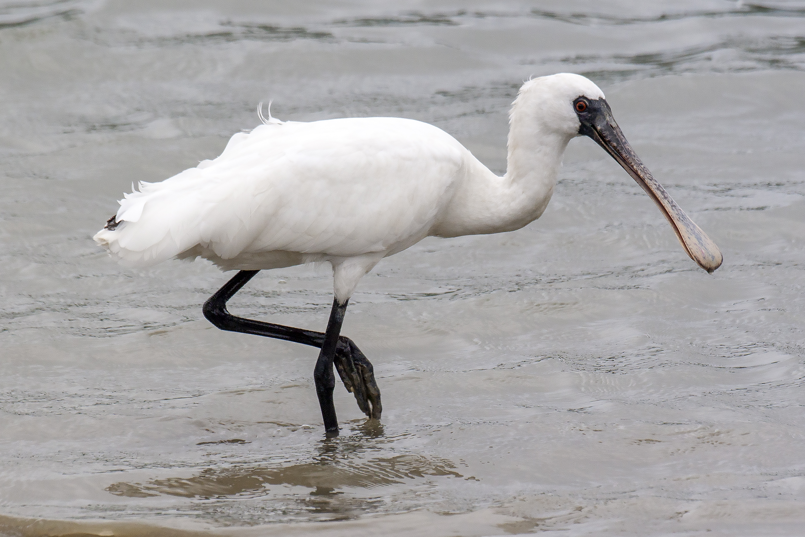 クロツラヘラサギ 沖縄県漫湖にて